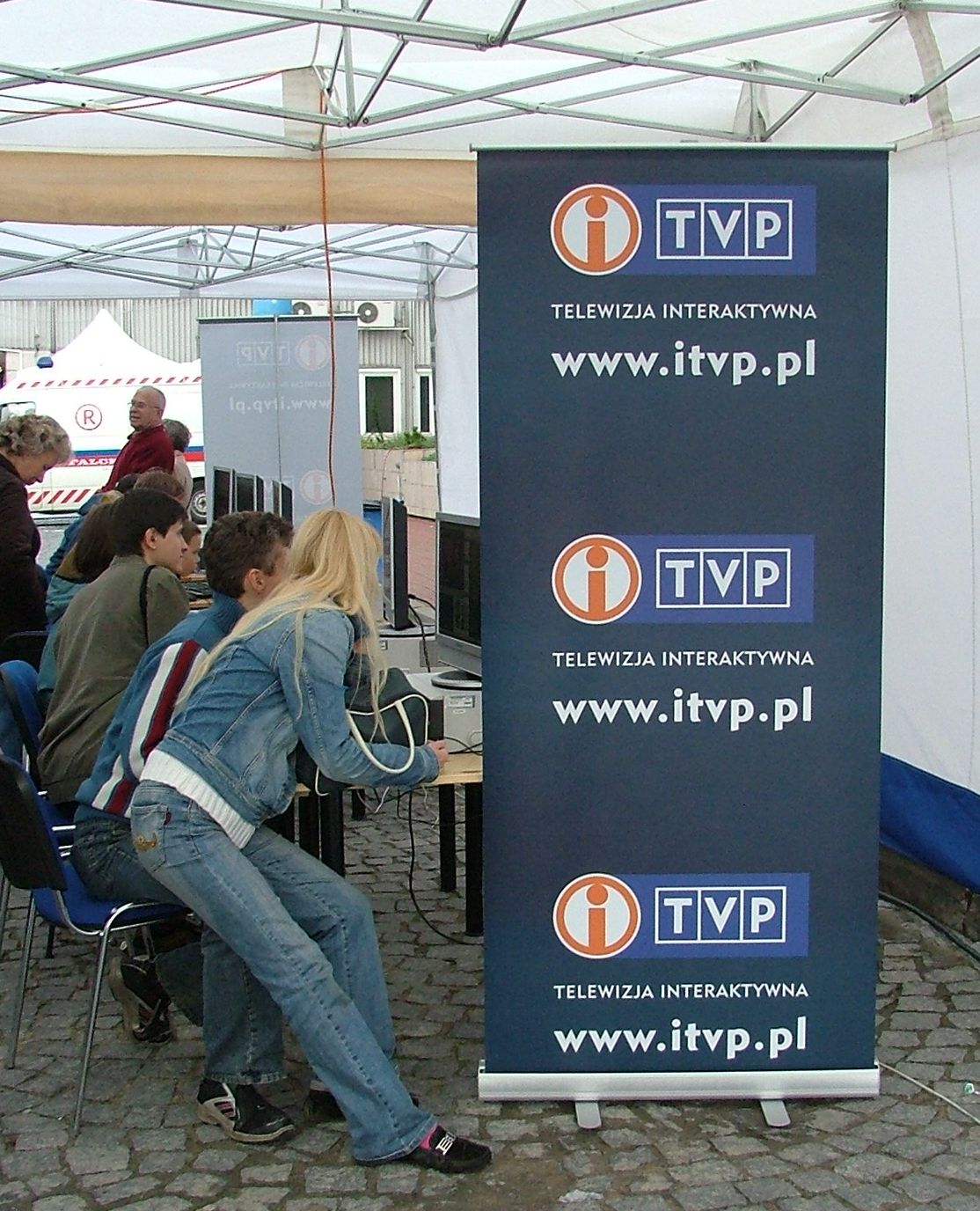 Poland, Warsaw, TVP, Dzień Otwarty Telewizji Polskiej, 9 września 2007